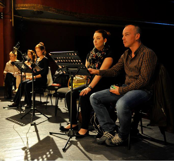 Renato Bonajuto durante le prove di Der Schauspieldirektor di Mozart al Teatro di stato di Istanbul